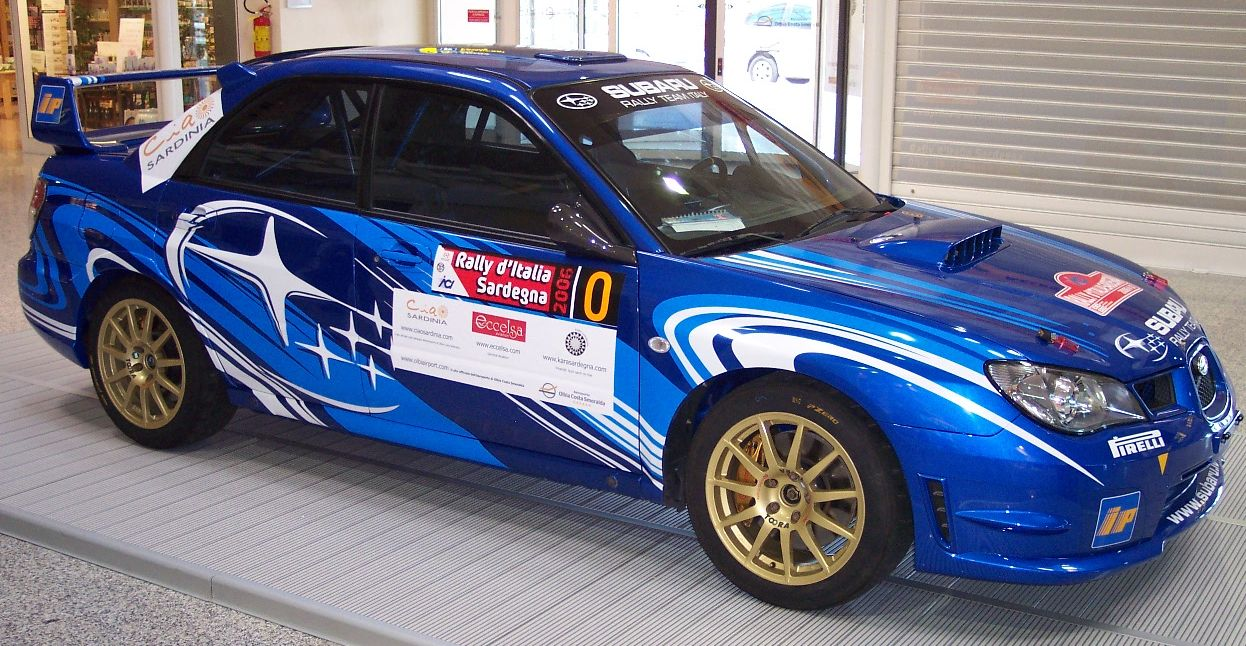 Subaru Impreza WRX N12 (N4)